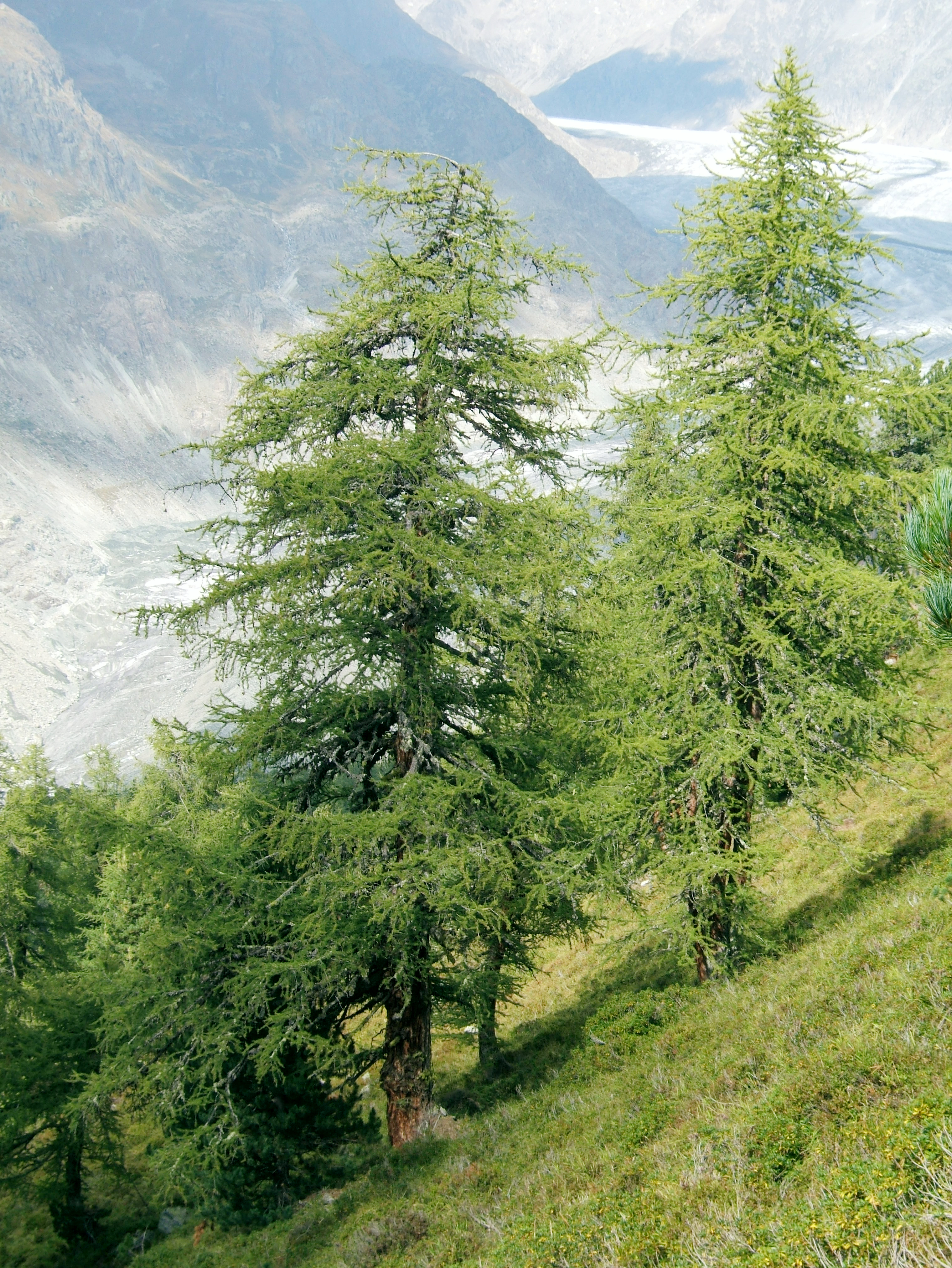 European Larch Larix decidua, Aletschwald, Switzerland.